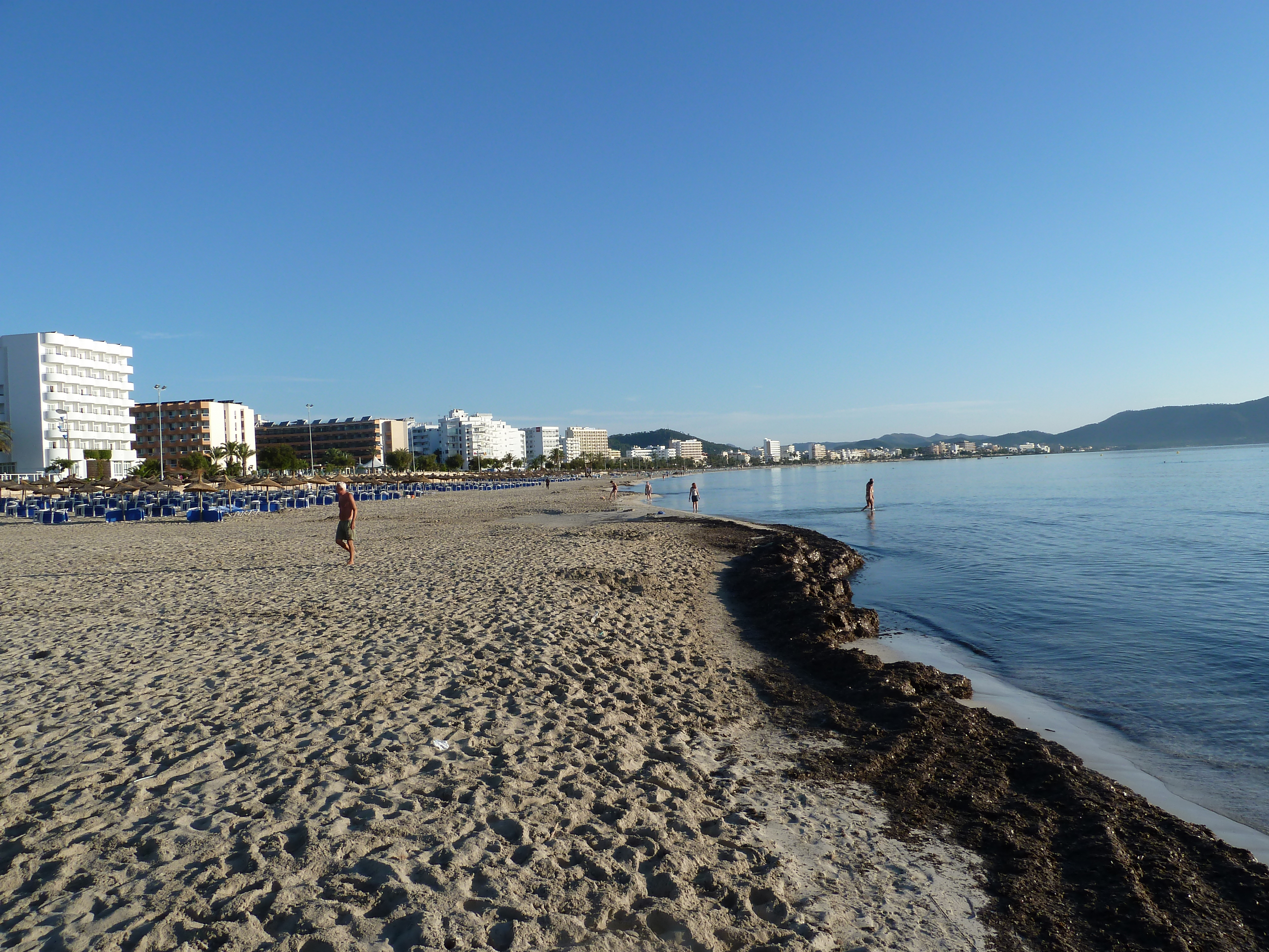 Strandfläche von Cala Millor